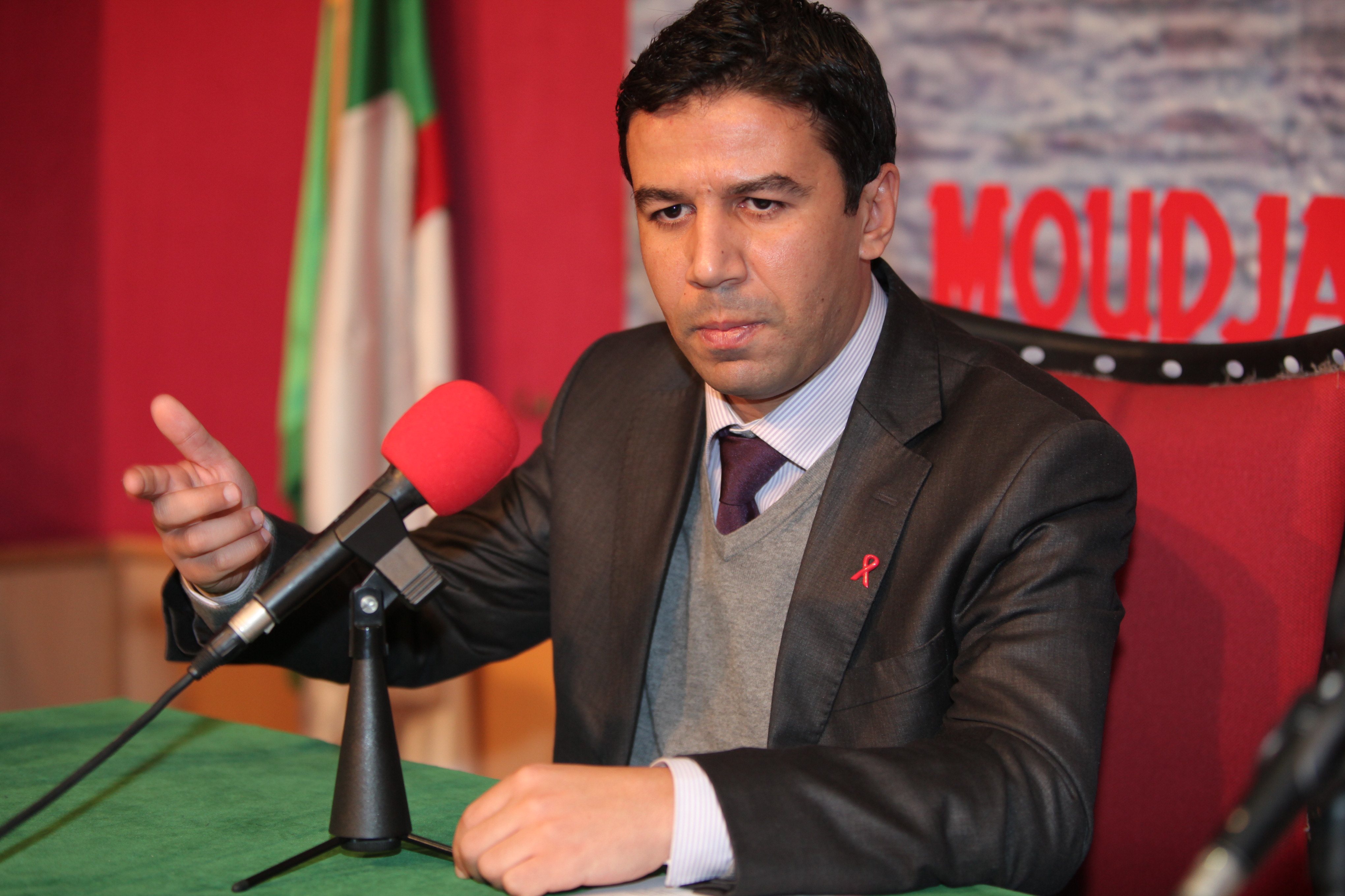 Le Docteur Skander Abdelkader Soufi lance une nouvelle campagne de sensibilisation au SIDA destinée à protéger les femmes et les enfants au forums El Moudjahid.